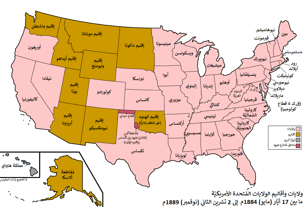 خريطة الولايات والأقاليم الأمريكيَّة كما كانت مُنذُ سنة 1884م وُصولًا إلى 2 تشرين الثاني (نوڤمبر) 1889م. بِتاريخ 17 أيَّار (مايو) 1884م، جُعلت دائرة ألاسكا مُقاطعة، وبِتاريخ 2 تشرين الثاني (نوڤمبر) 1889م قُسِّم إقليم داكوتا إلى قسمين جُعلتا ولايتا داكوتا الشماليَّة والجنوبيَّة.